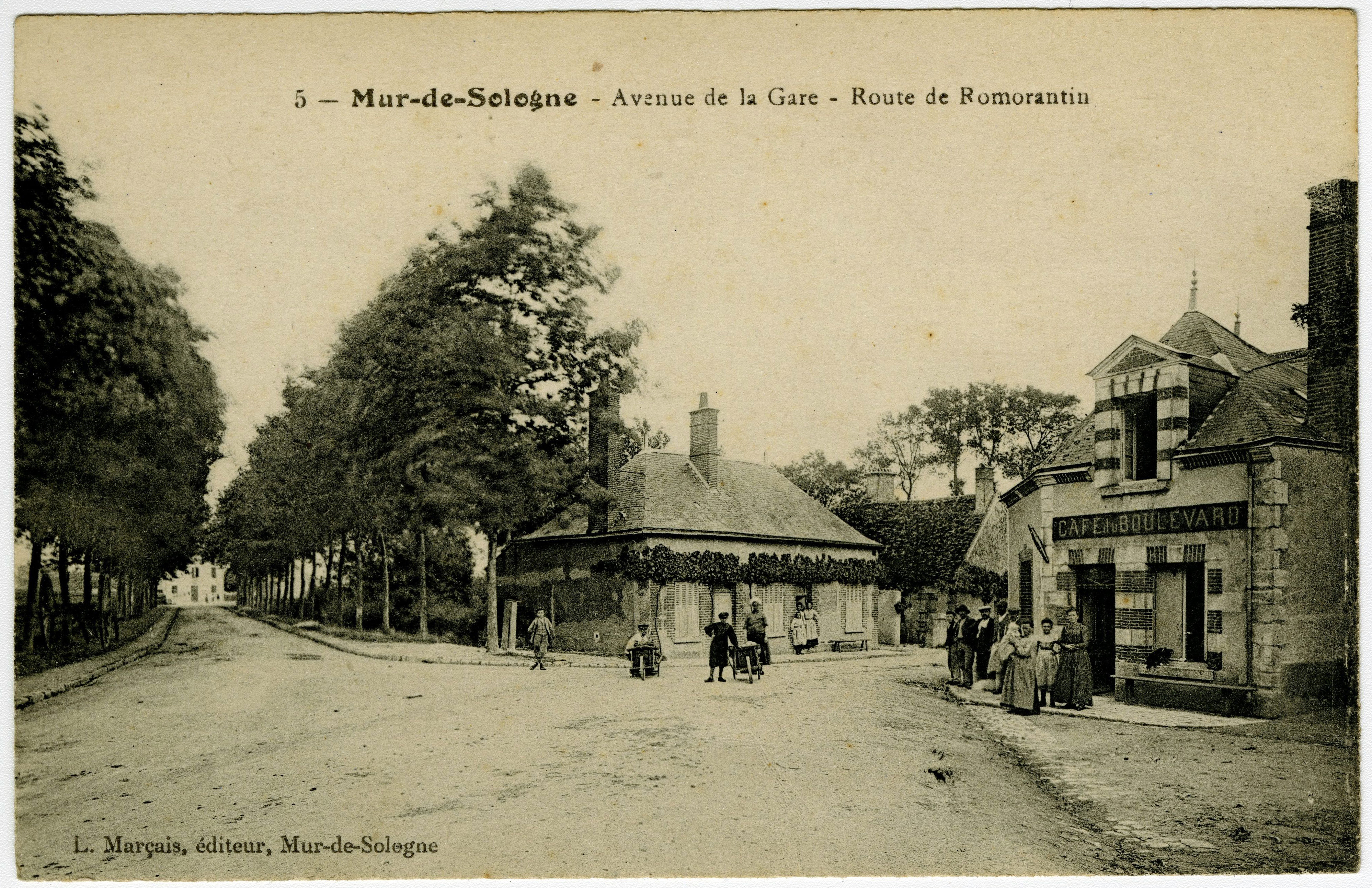 Carte postale ancienne noir et blanc de Mur-de-Sologne (avant les années 1920) : avenue de la Gare - route de Romorantin. Editeur : L. Marçais (Mur-de-Sologne). Groupe de personnes posant le long de la route et devant le Café du Boulevard.